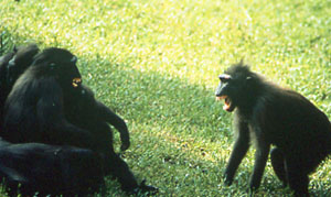 Macaca nigra. Une femelle entre en conflit. Photographie de Bernard Thierry avec son aimable autorisation.